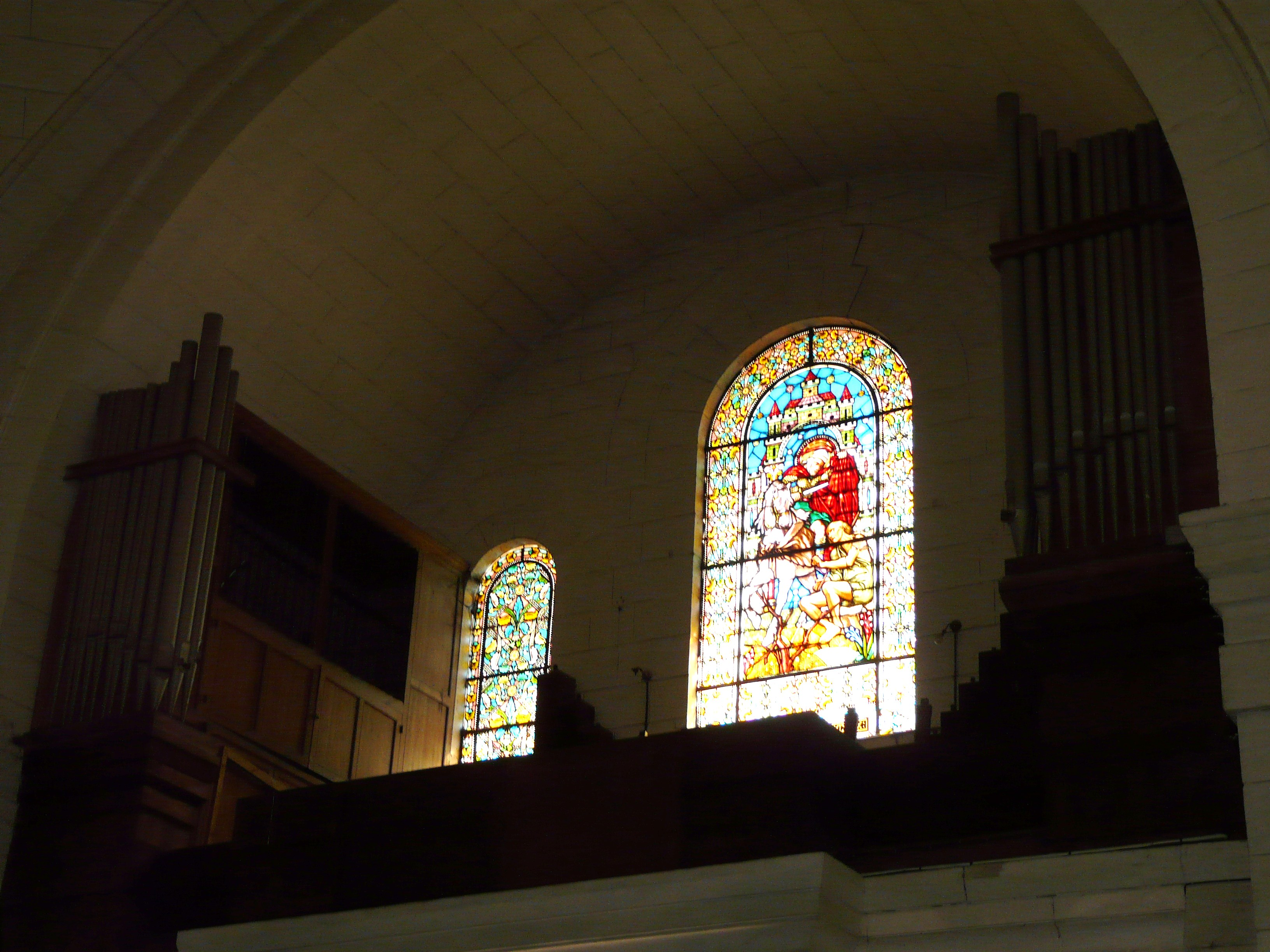 L'orgue et les vitraux de la tribune, église Saint-Martin, Périgueux, Dordogne, France.